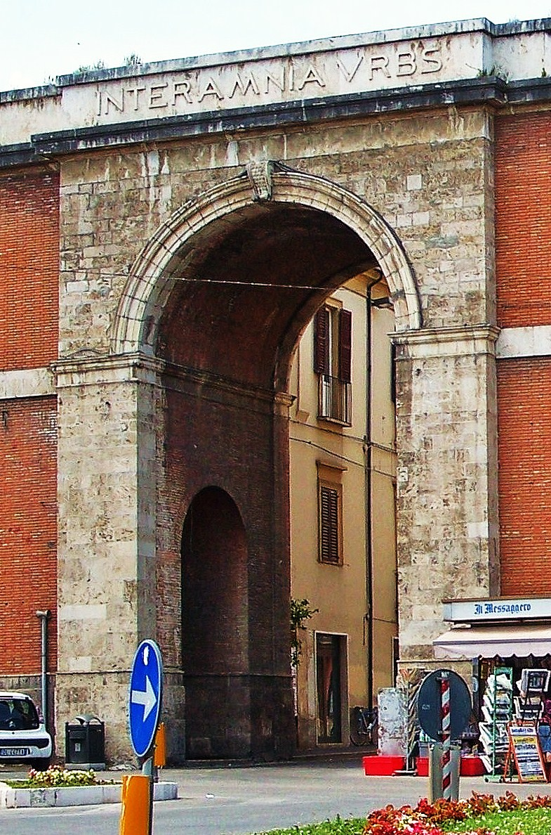 Porta Reale (per i teramani "Porta Madonna") è un arco onorario eretto per accogliere la visita di Ferdinando I di Borbone.